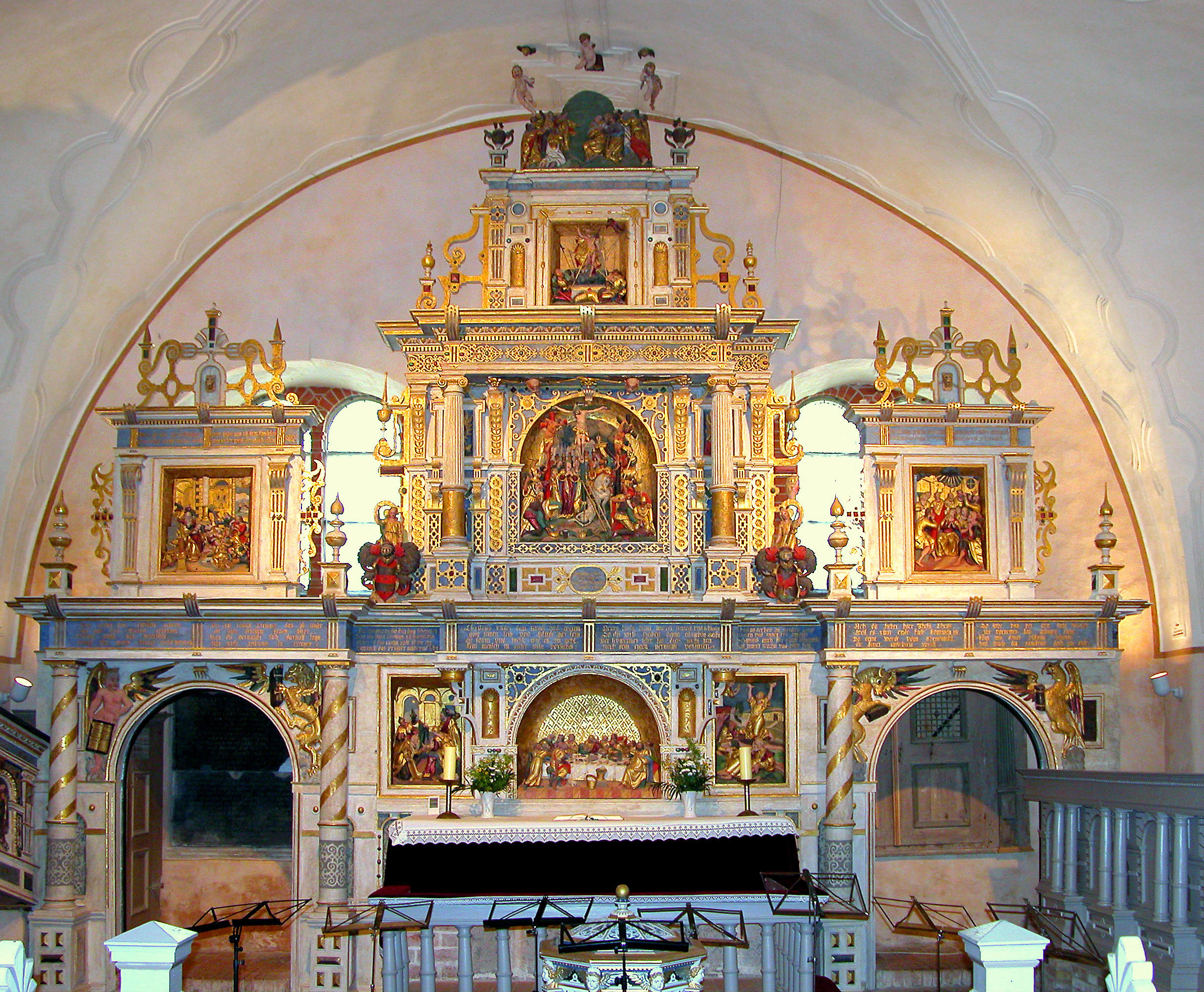 05.07.2003 17166 Bristow (Schorssow), Dörpstrat (GMP: 53.712304,12.623837): Die Dorfkirche wurde 1597-1601 als schlichte Kapelle erbaut und später im Stil der Renaissance erweitert. Älteste protestantische Dorfkirche Mecklenburgs. Einziger Renaissance-Altar mit der originalen Farbgebung und Bemalung (um 1600). [DSCN]20030705680DR.JPG(c)Blobelt